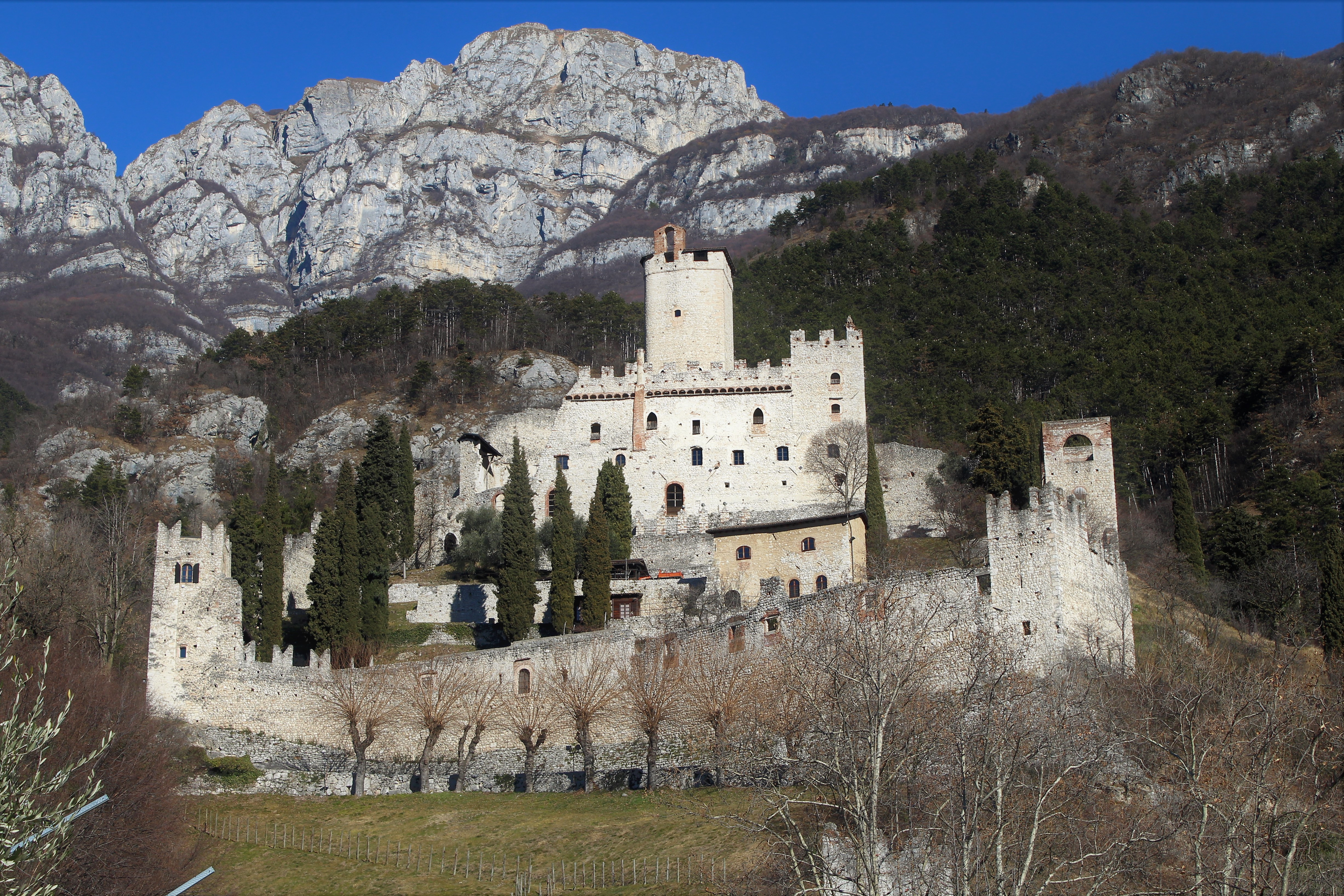 Castello di Avio-Sabbionara in provincia di Trento